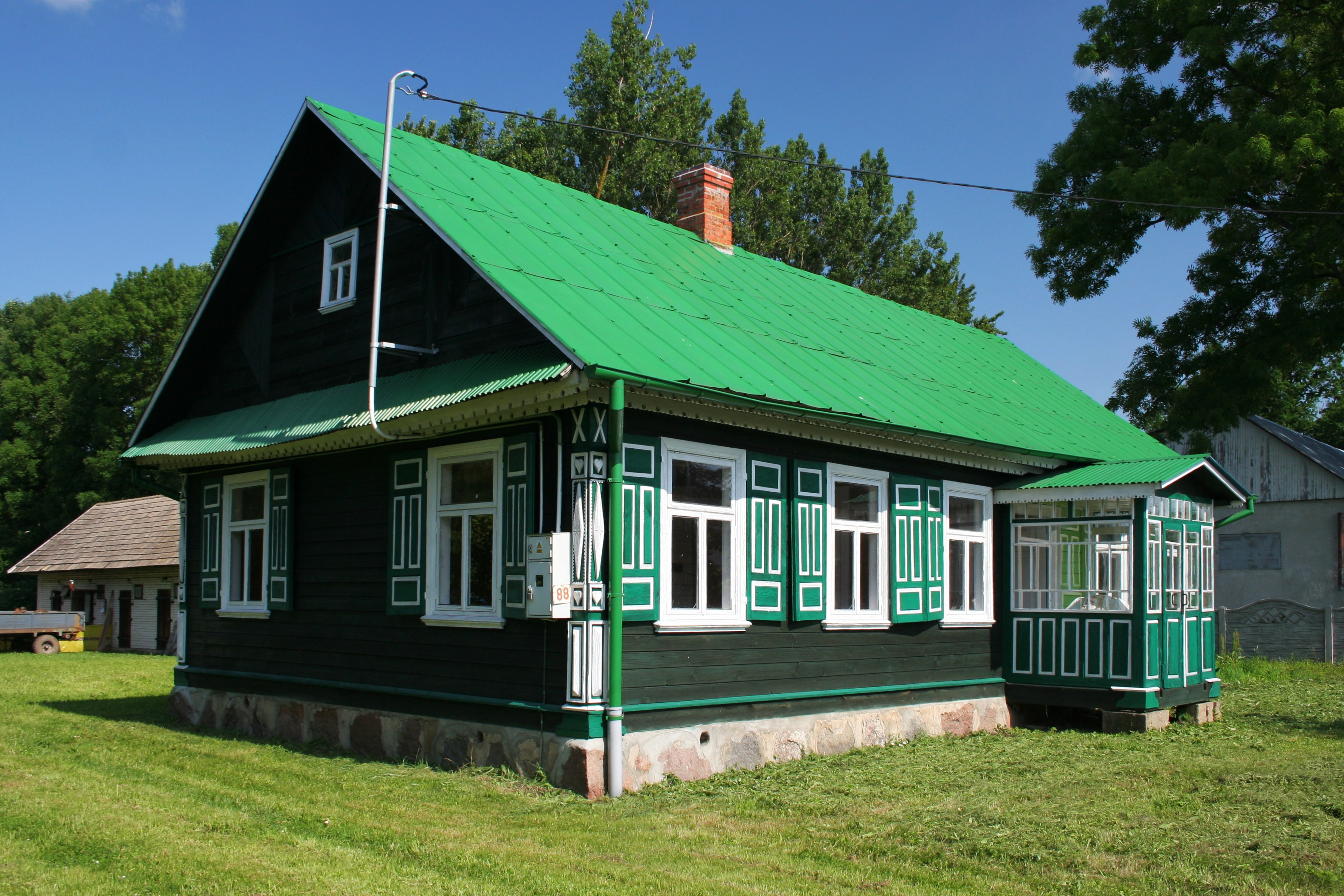 Dom w Nowoberezowie.